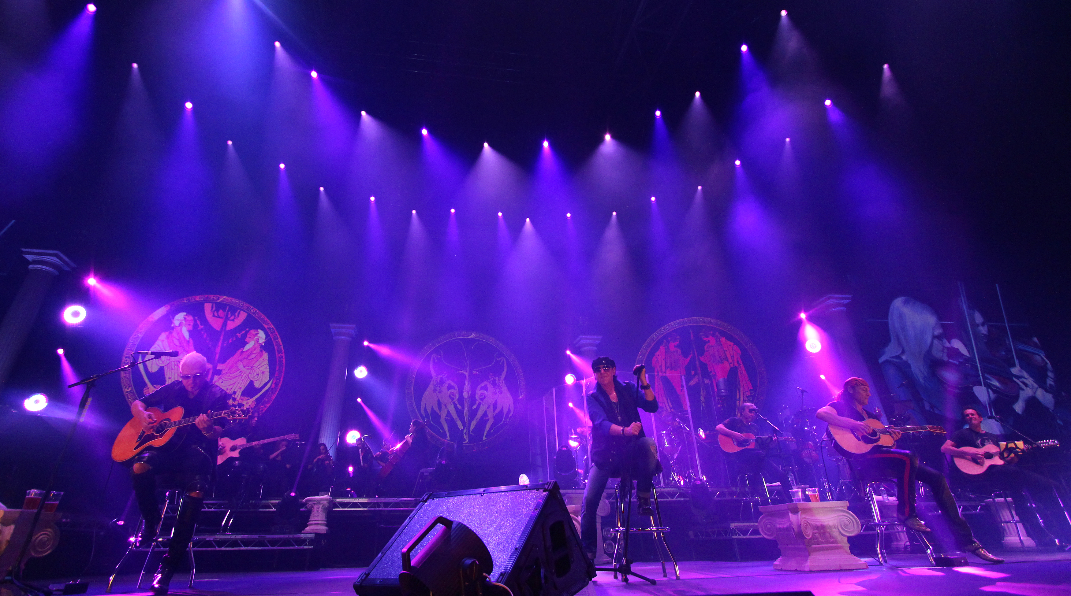 Scorpions Unplugged April 2014